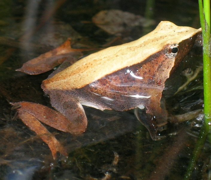 Darwin's Frog (Rhinoderma darwinii)